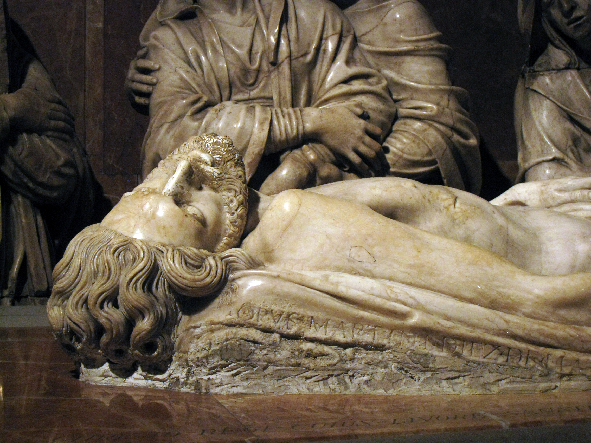 Catedral del Sant Esperit (Terrassa), el_Sant_Enterrament_de_Martín_Díez de Liatzasolo (1544)